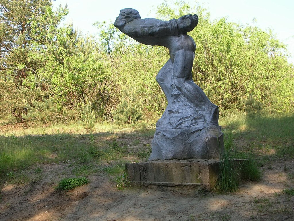 Pomnik w Dolinie Śmierci